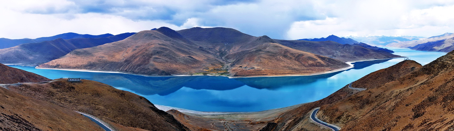 Tibet :lac Yamdrok Tso